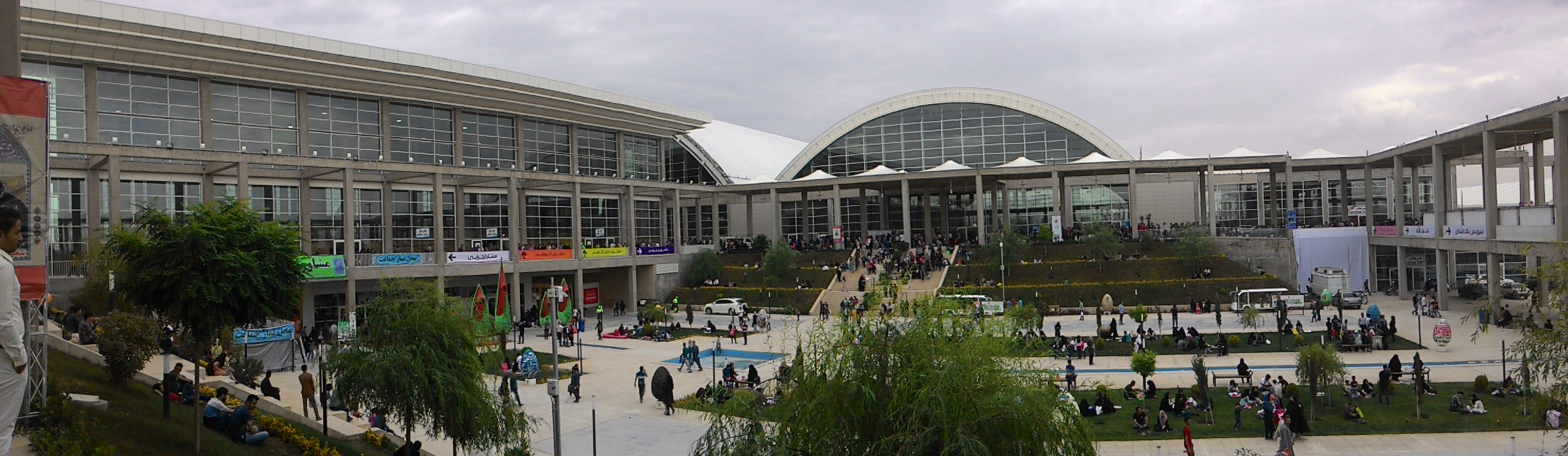 نمایی از بیست و نهمین نمایشگاه بین‌المللی کتاب تهران